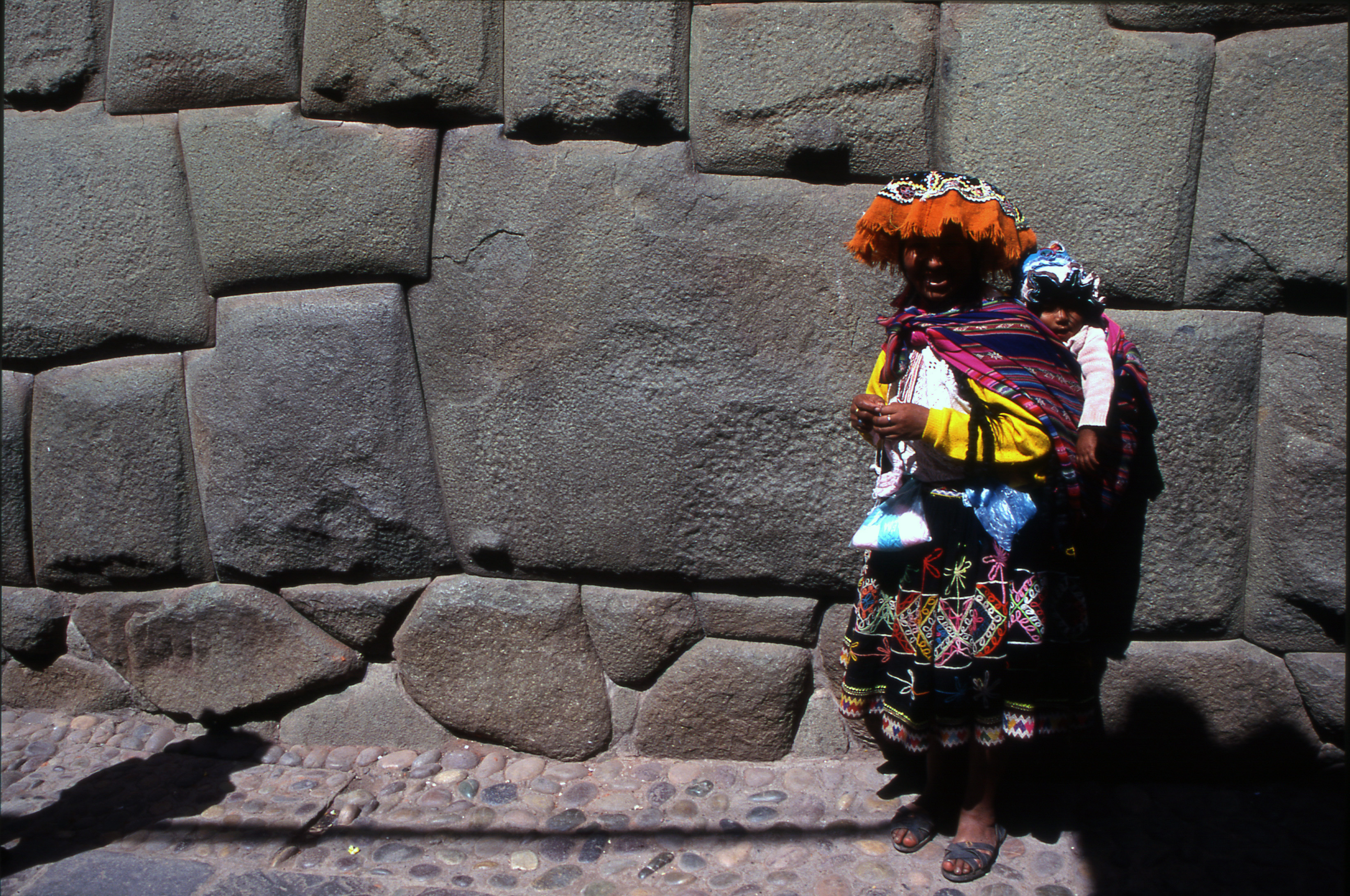 Perou Cusco la pierre aux douze angles incas